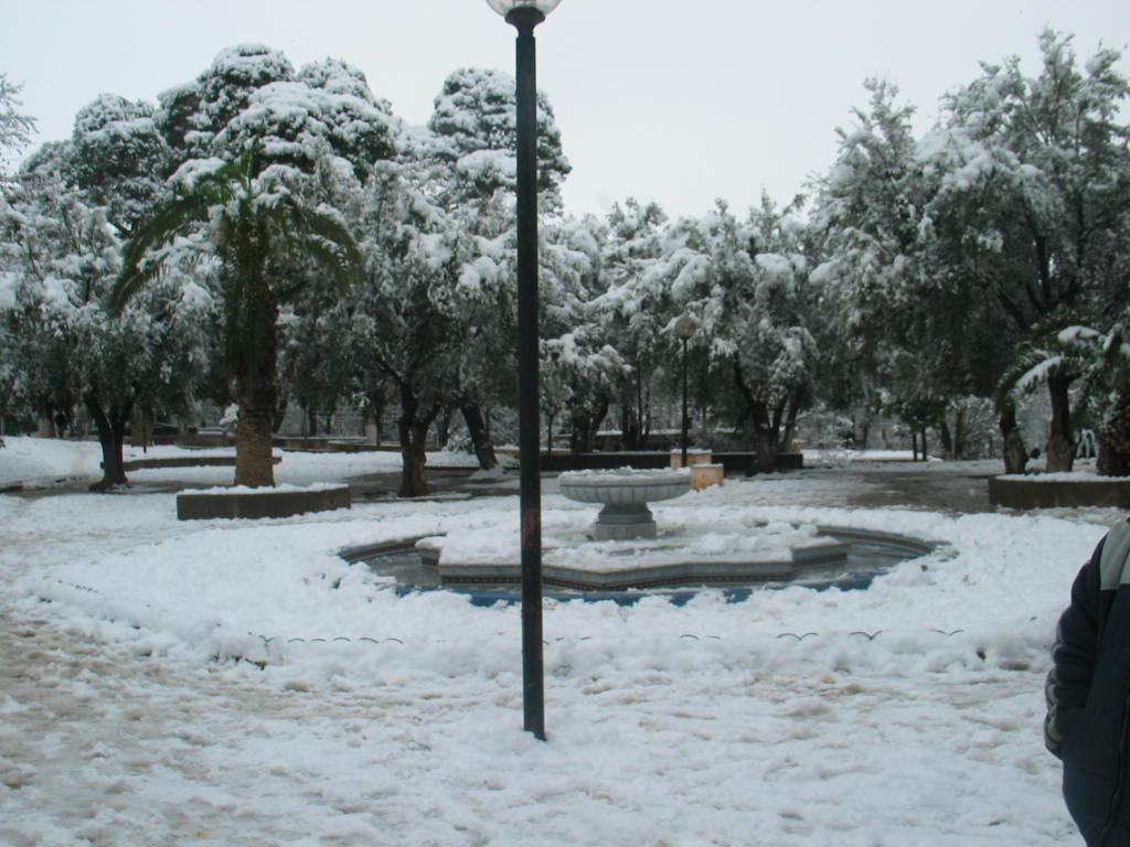 رغم تقلص كميتها في العقود الأخيرة ، فان مدينة صفرو ما زالت تعرف تساقط الثلوج